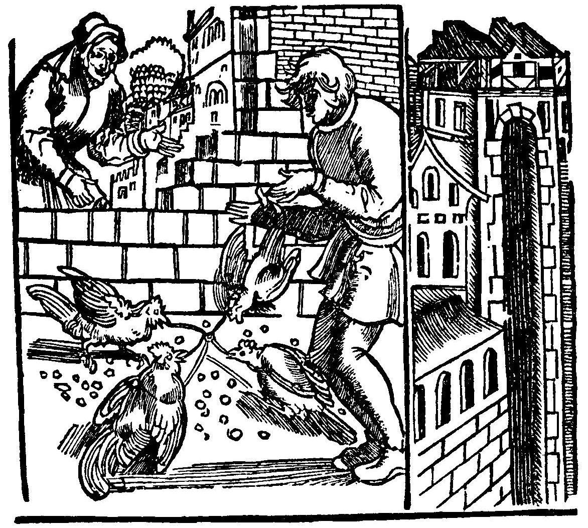 Ein kurtzweilig lesen von Dyl Vlenspiegel gebore vß dem land zu Brunßwick : wie er sein Leben vollbracht hatt ; XCVI seiner Geschichten